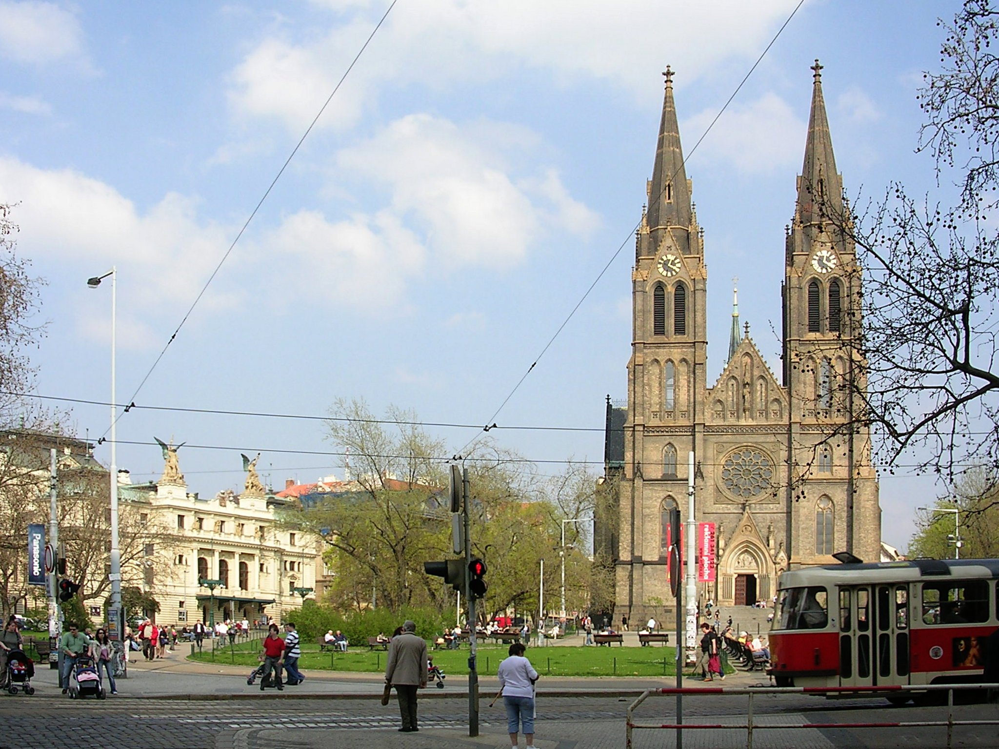 Praha, náměstí Míru